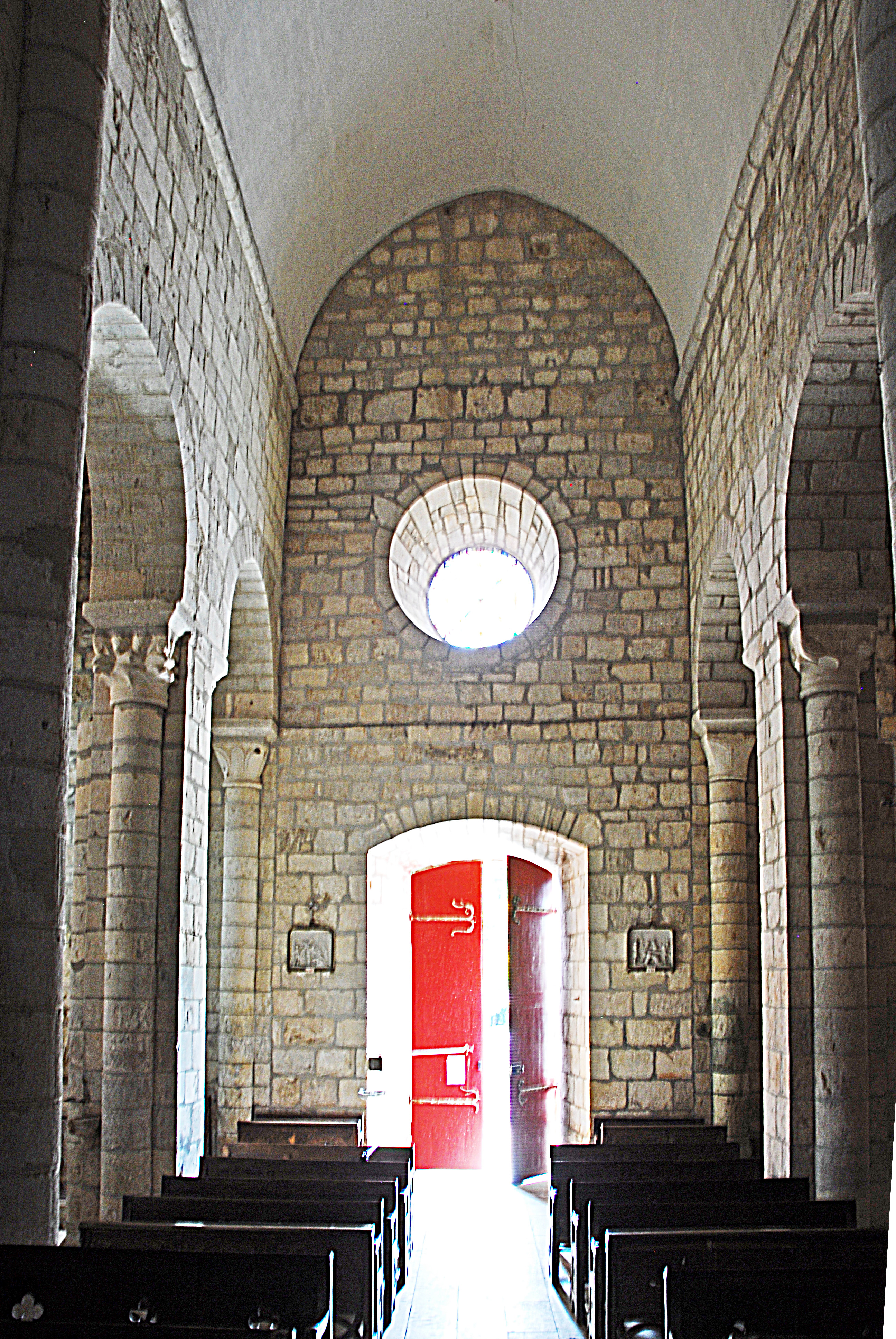 Ste-Croix de Veauce, Mittelschiff, Westwand